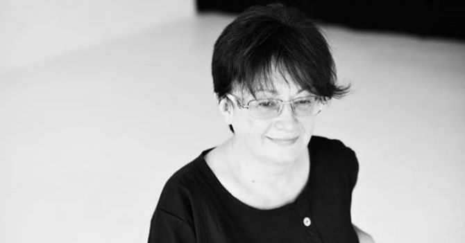 Фото Олександри Коваль, президента ГО "Форум видавців"